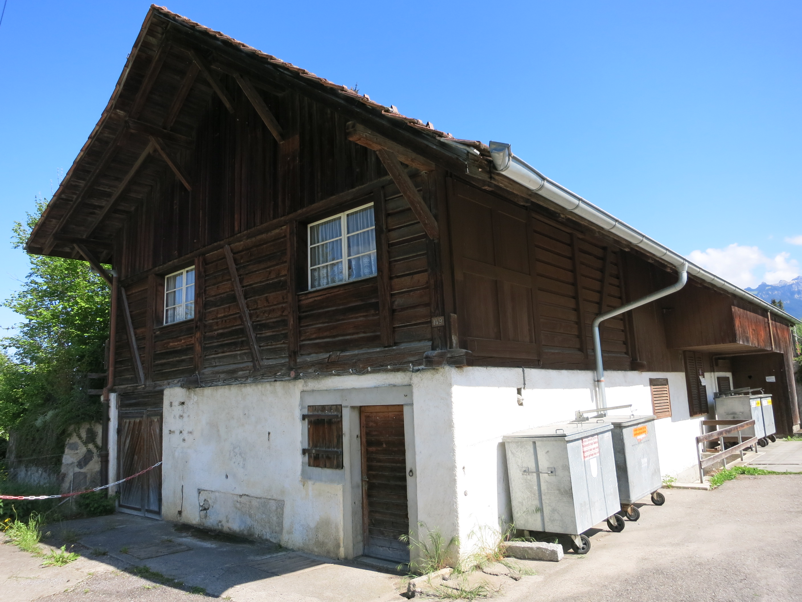 Versuchsstand Hentschenried, Spiez BE, Schweiz